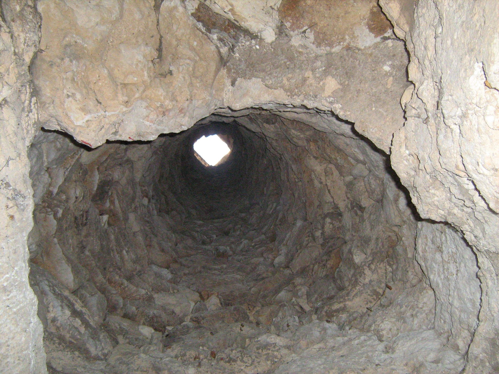 פיר אמת המים התחתונה - מבט מעלה אל אחד הפירים האנכיים